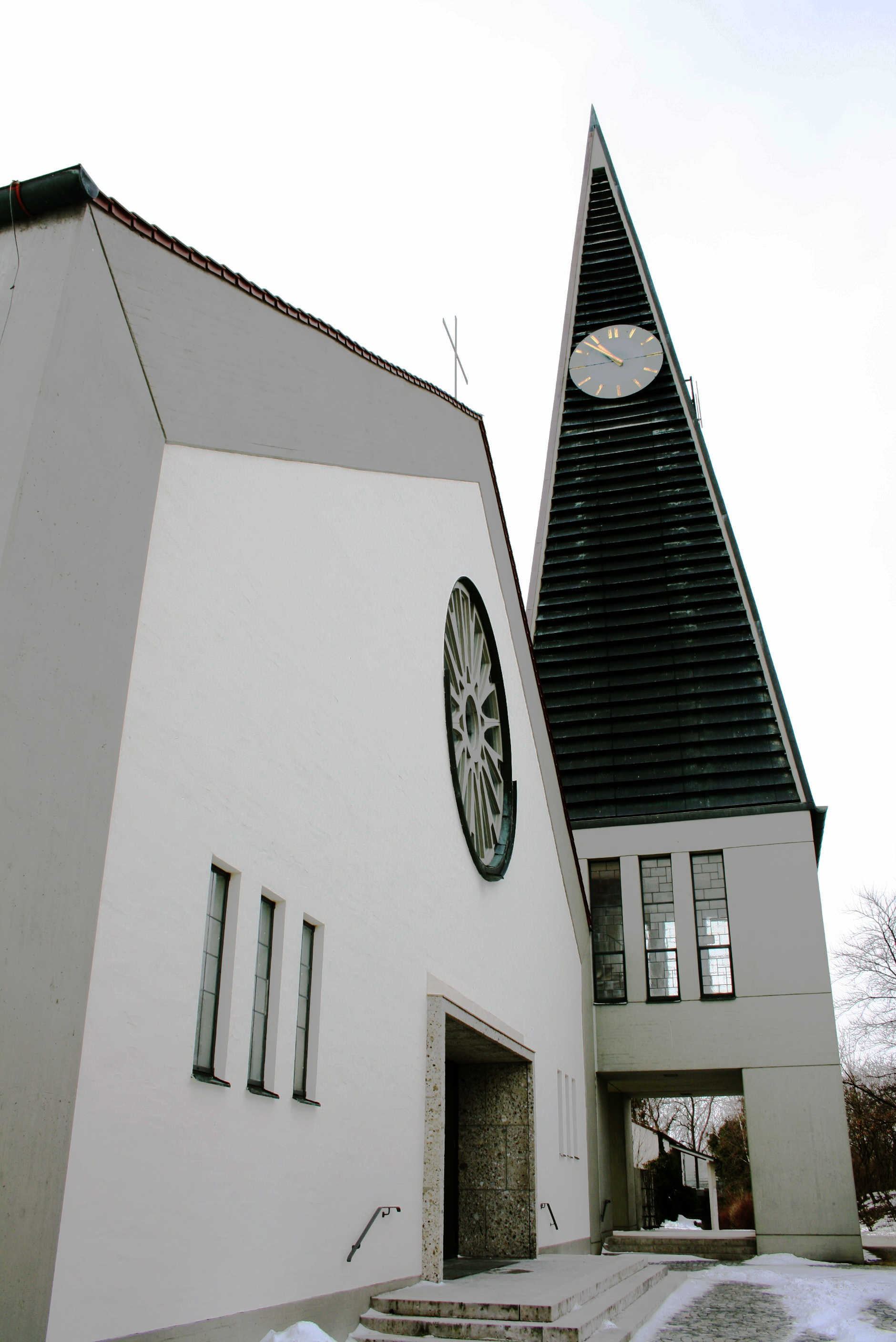 Kirche St. Fabian u. Sebastian in Derching.